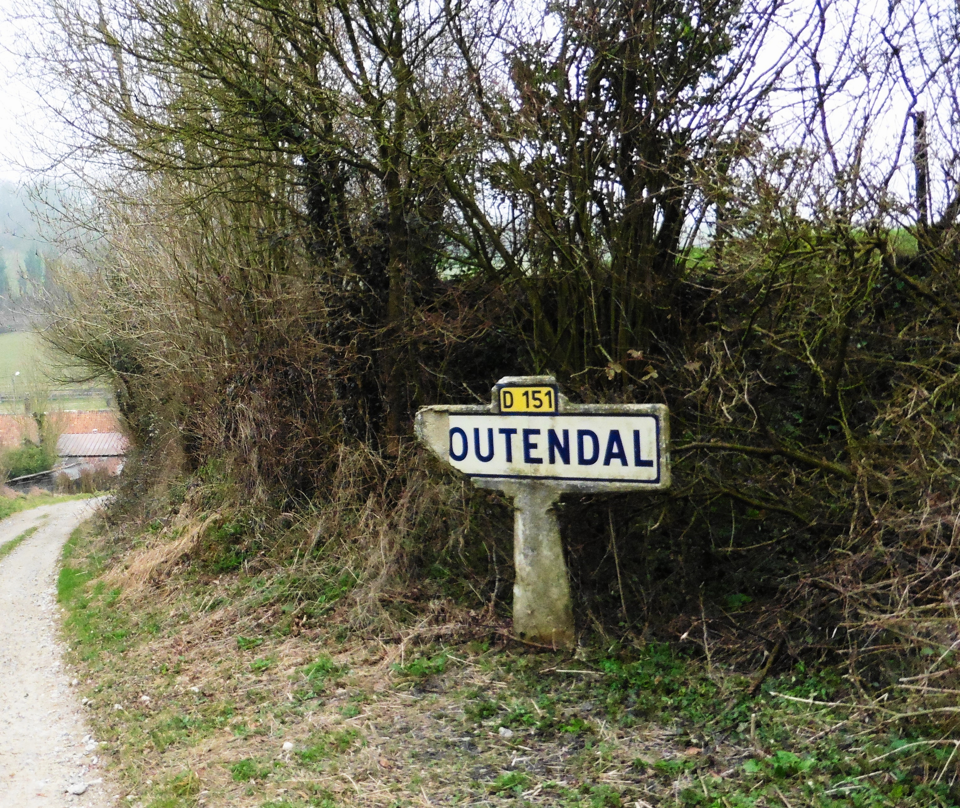 Borne du hameau de Toutendal à Alette.- Pas-de-Calais.- ( Pas-Calés).- France.